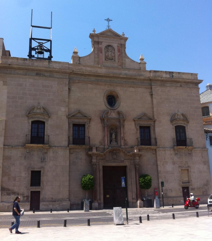 Fachada de la Iglesia de San Andrés de Murcia (Región de Murcia, España). Realizada en el siglo XVIII.